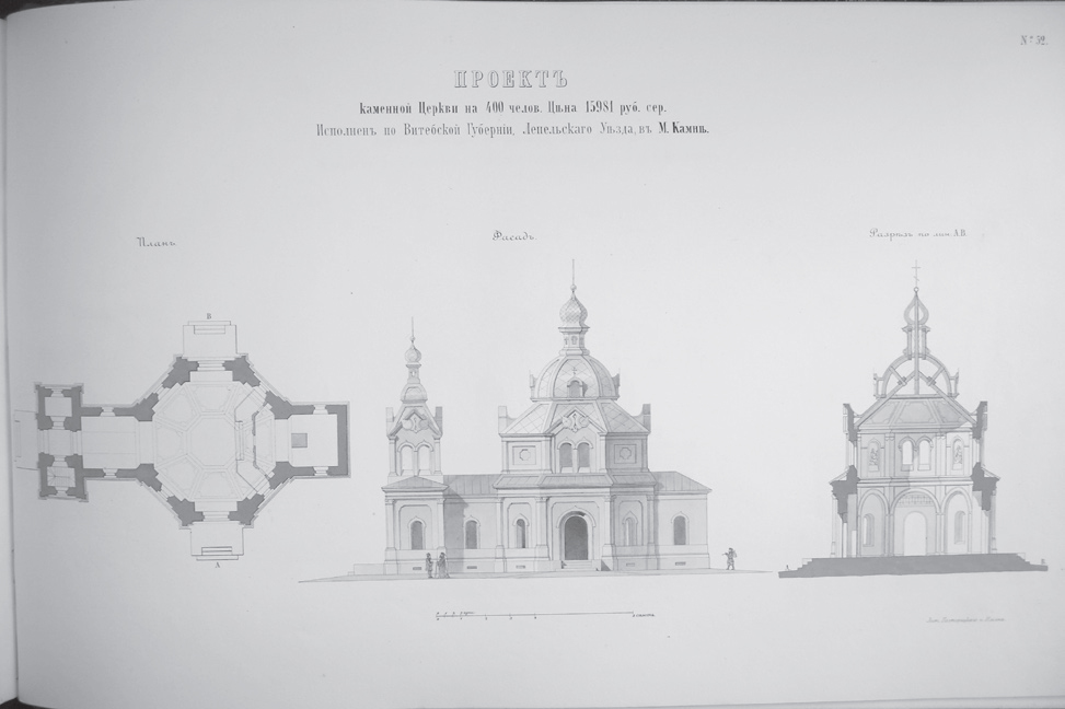 Беларуская (тарашкевіца): Камень (Kamień). Царква-мураўёўка, праект